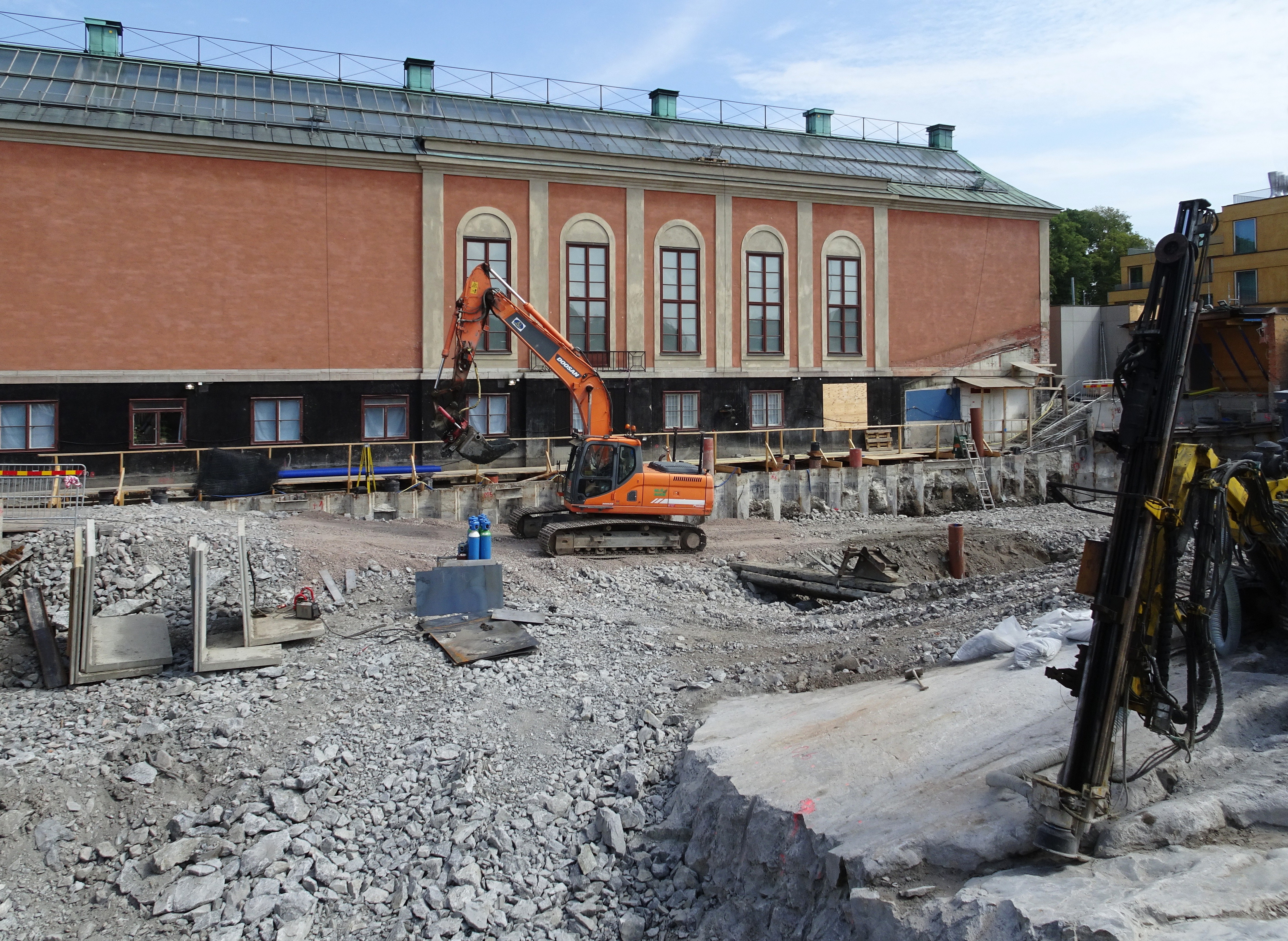 Byggarbeten vid Liljevalchs konsthall